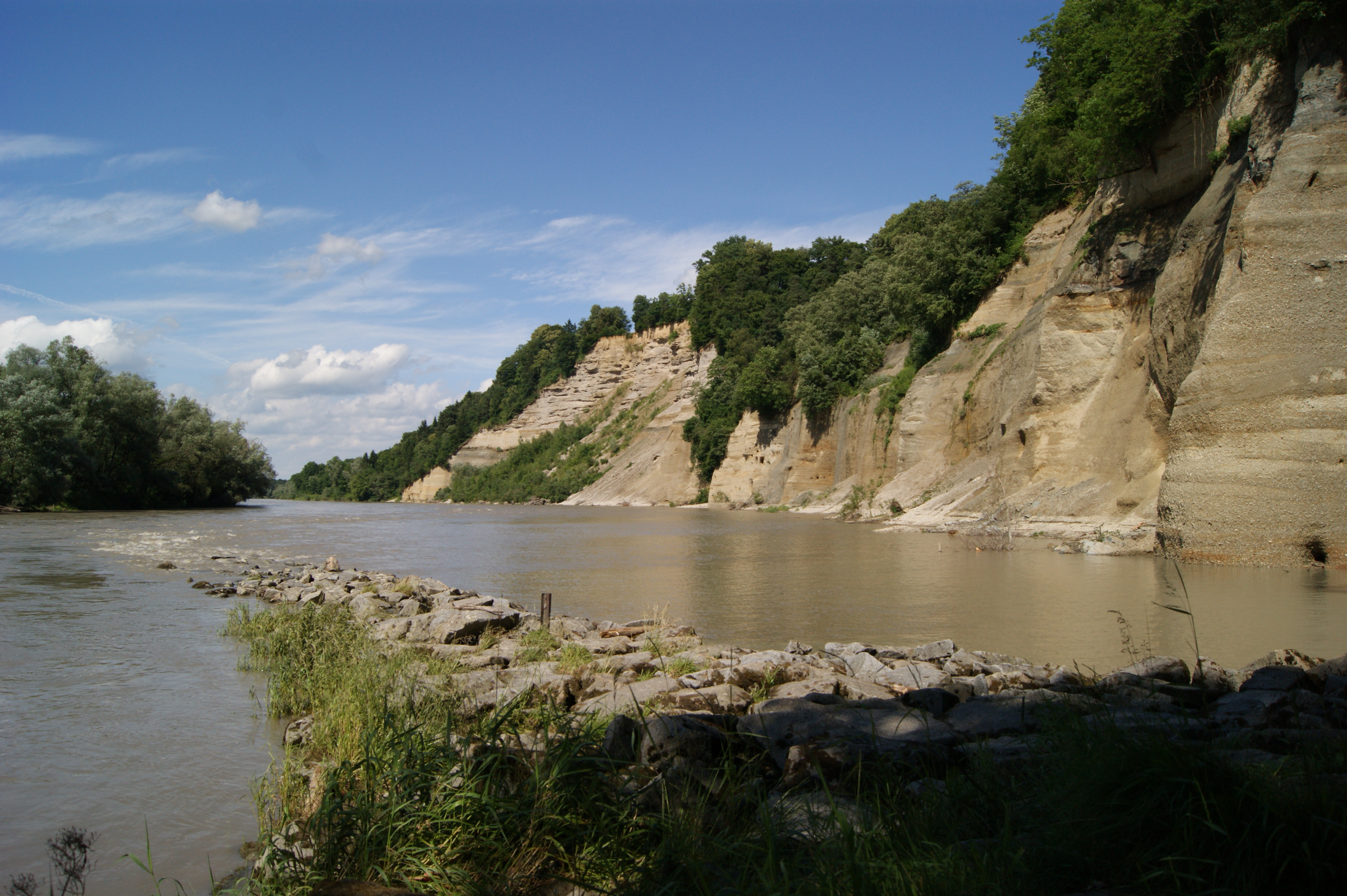 Durchbruch der Salzach bei Burghausen (vorn: sog. Hund)